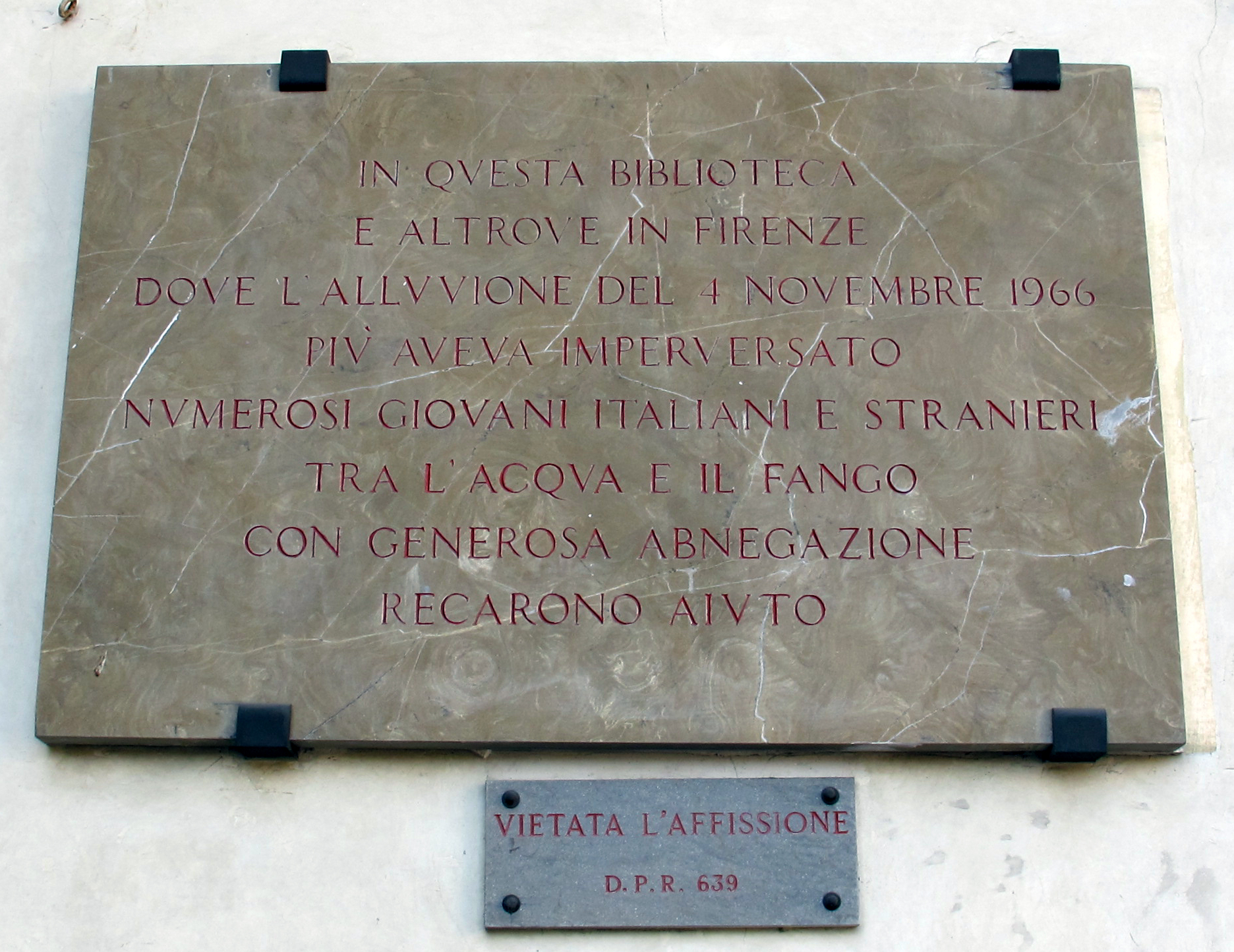 Bncf, targa angeli del fango